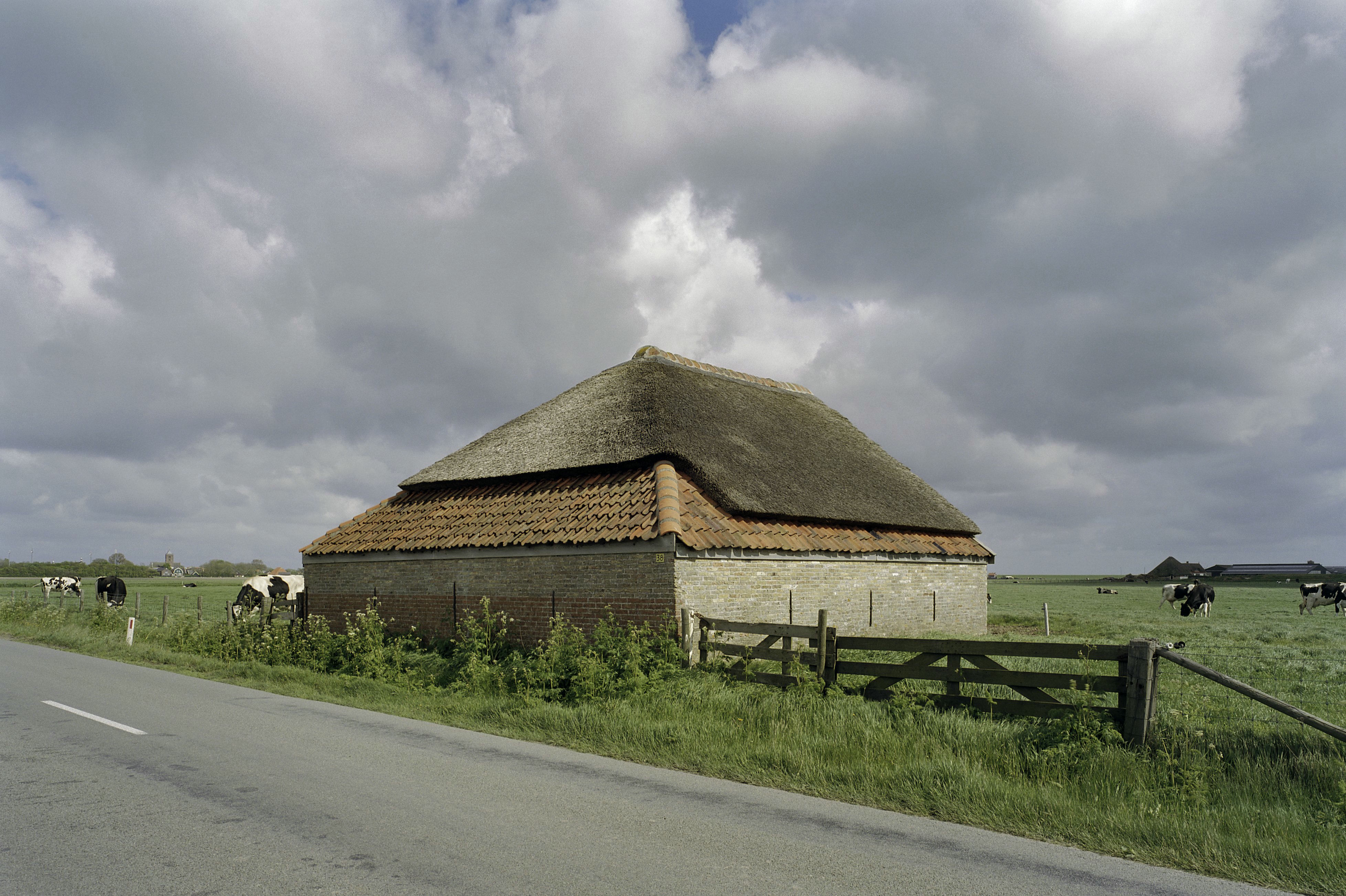 Schaapskooi: Schaapskooi met rieten dak gezien vanaf de weg (opmerking: Gefotografeerd voor Monumenten In Nederland Noord-Holland)